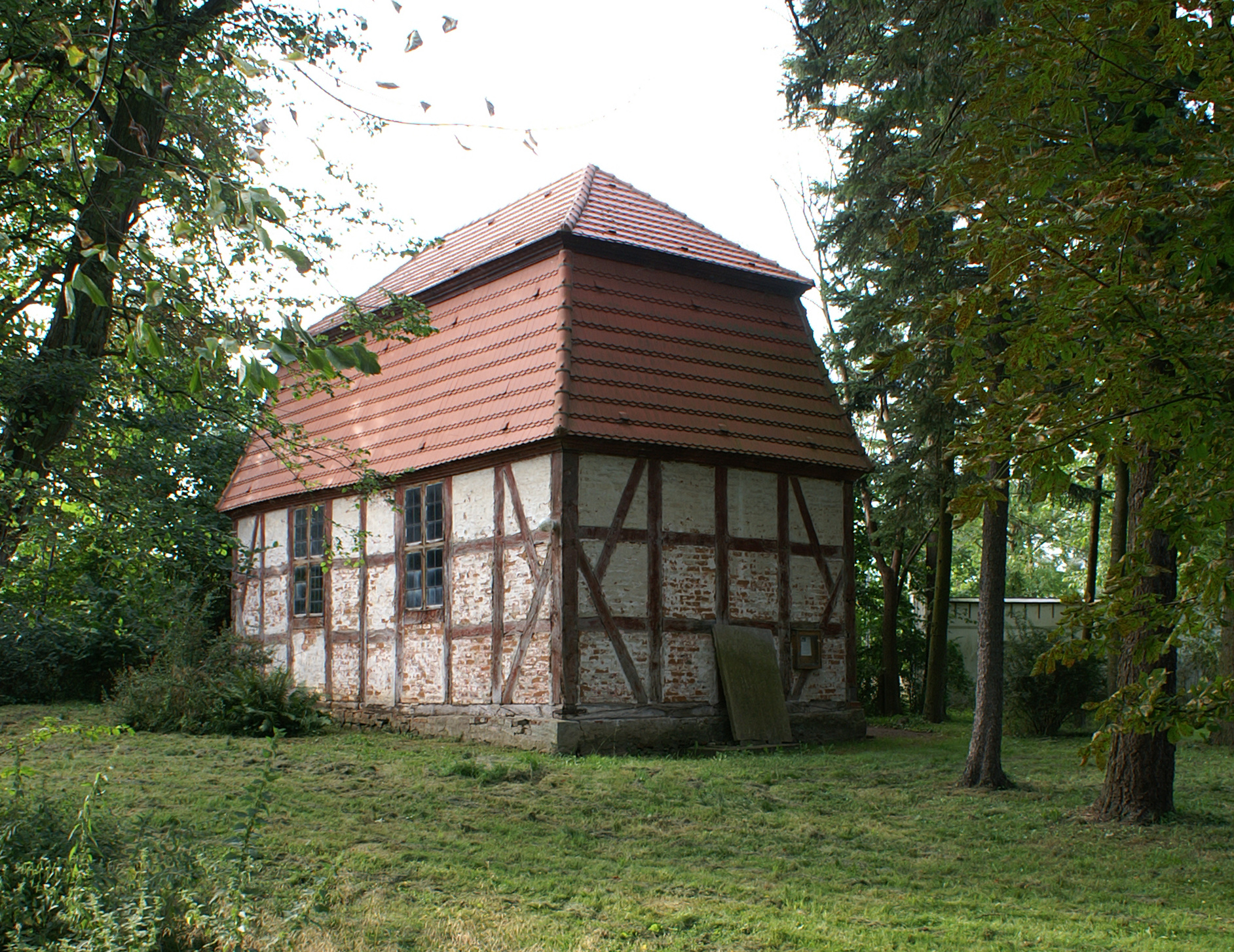 Kapelle Klevenow, Südseite und Ostgiebel